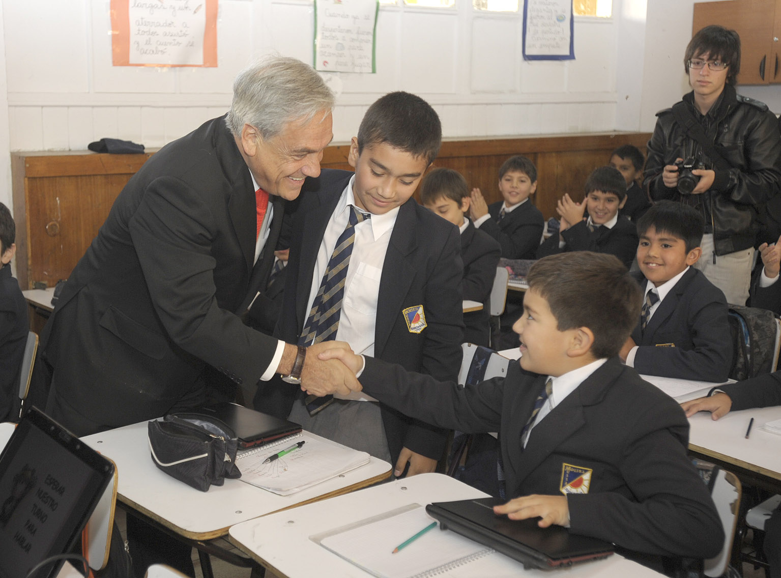 Sebastián Piñera visita Colegio Moisés Mussa, 2012.